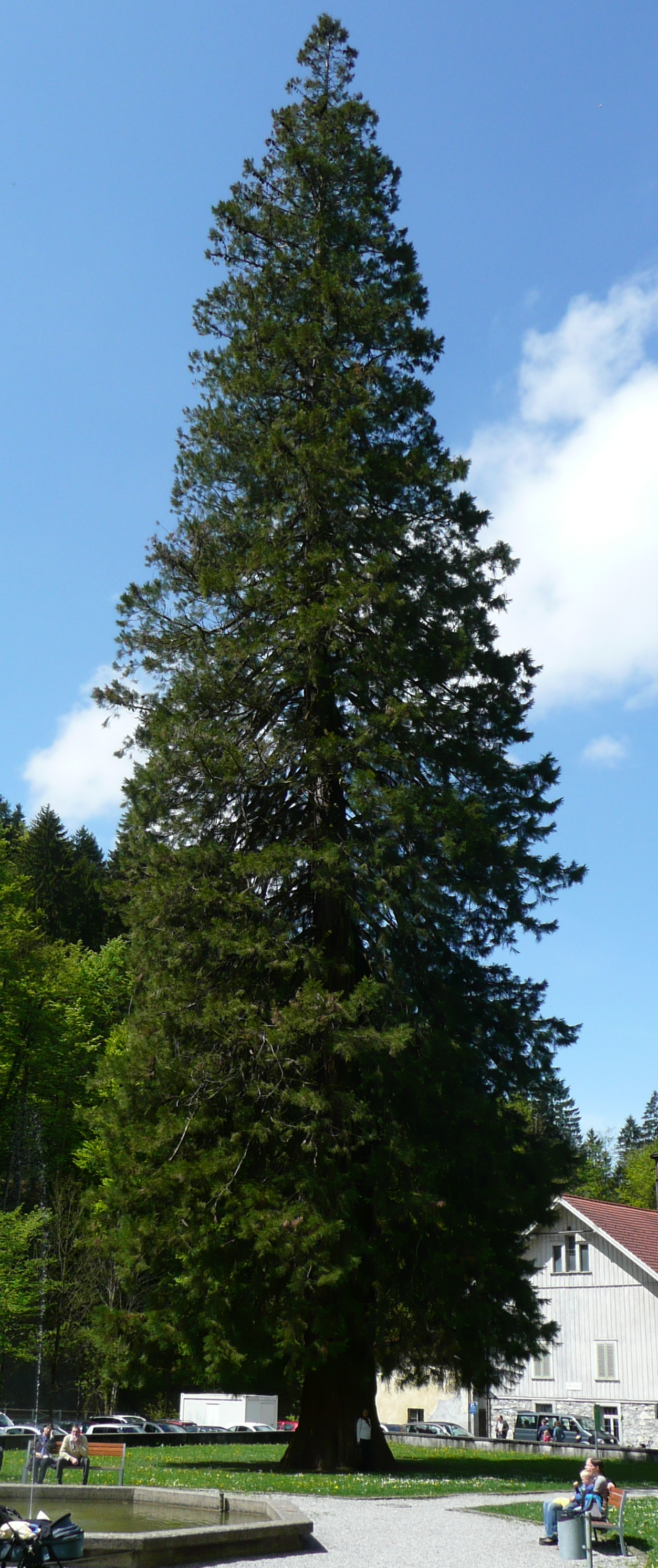 Mammutbaum im Gütle This media shows the natural monument in Vorarlberg with the ID 34.